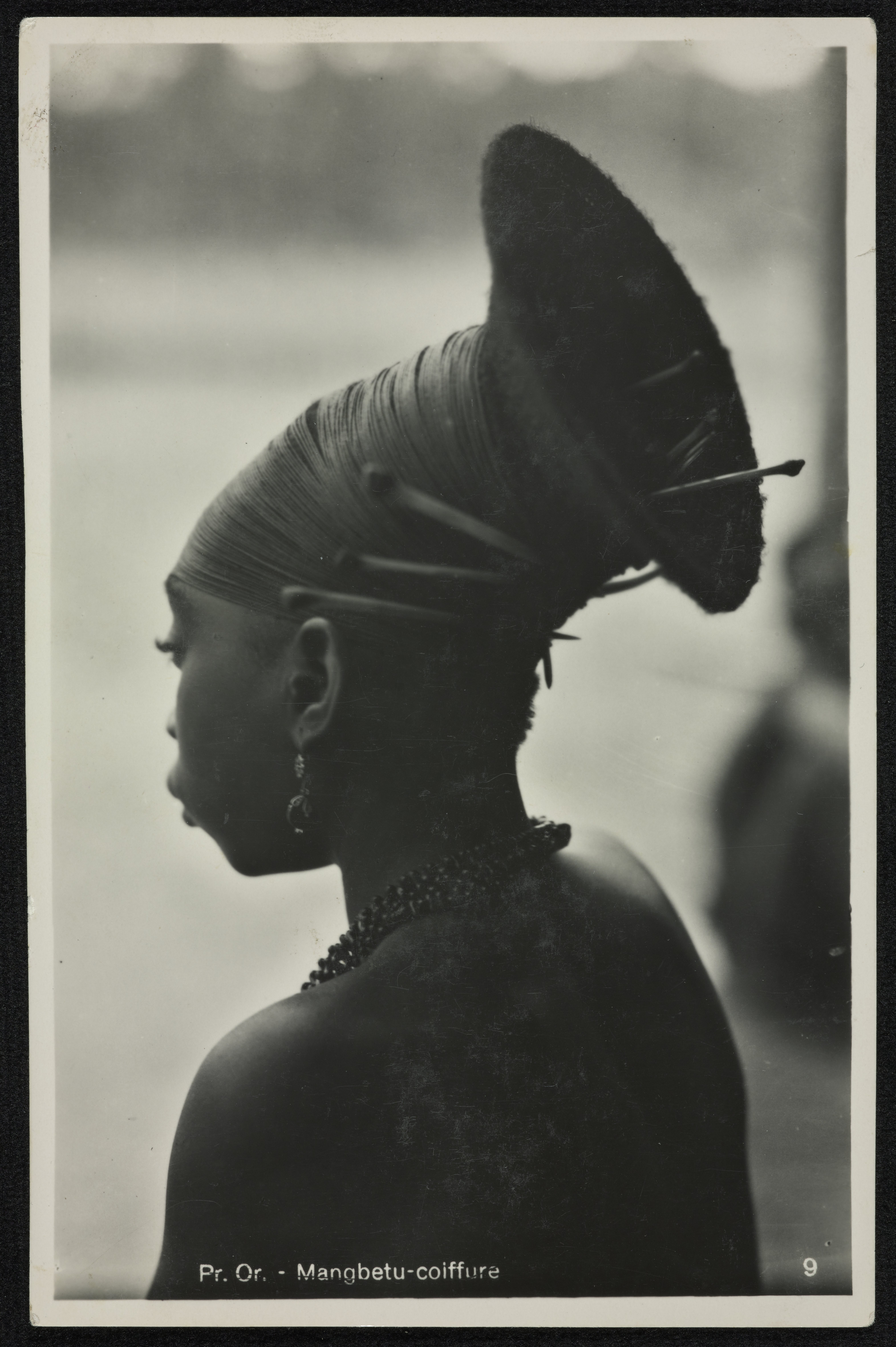 Mangbetu coiffure, photo de Kazimierz Zagórski, 1928-1938